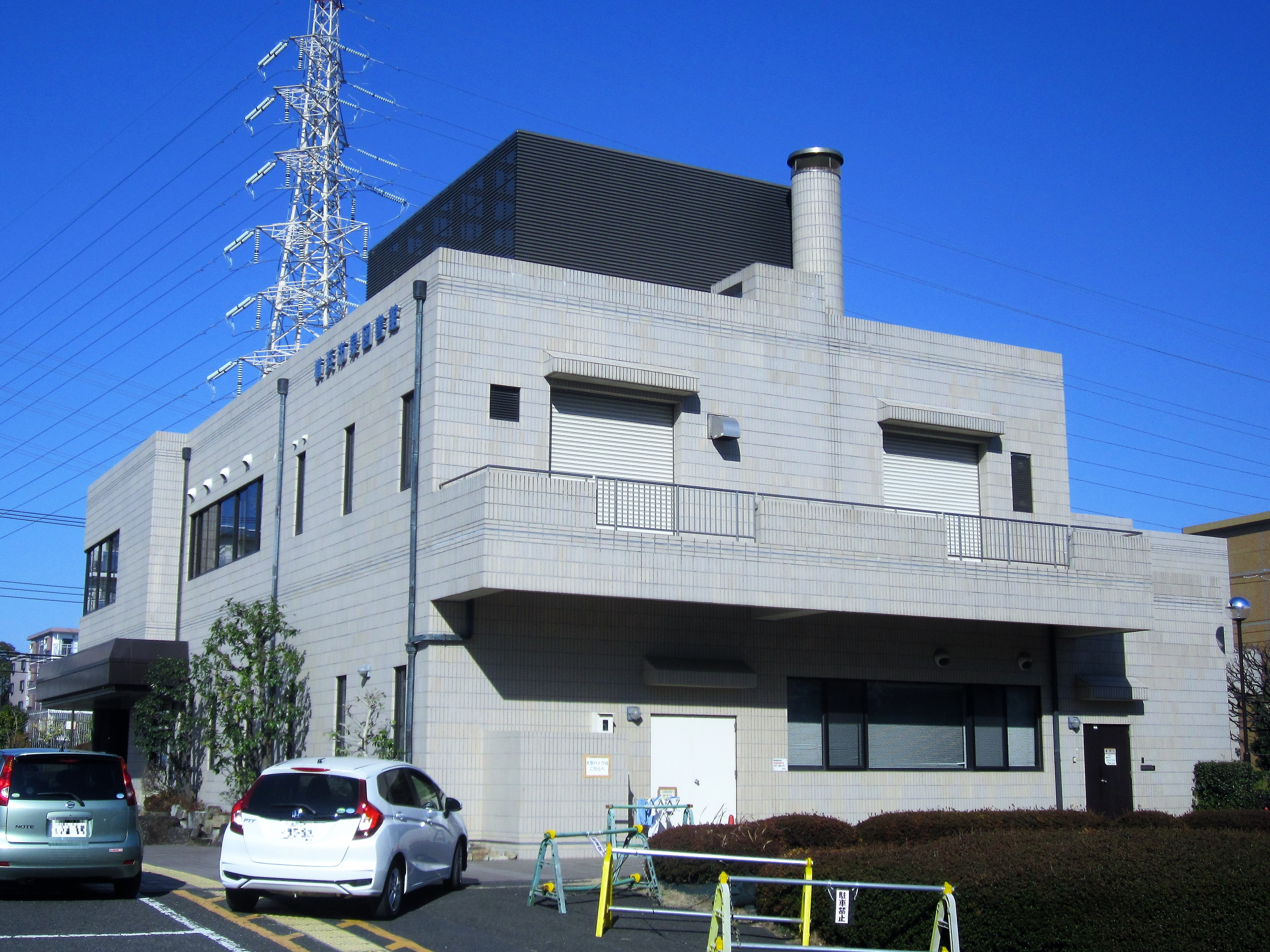 横浜市泉図書館（横浜市泉区和泉町）